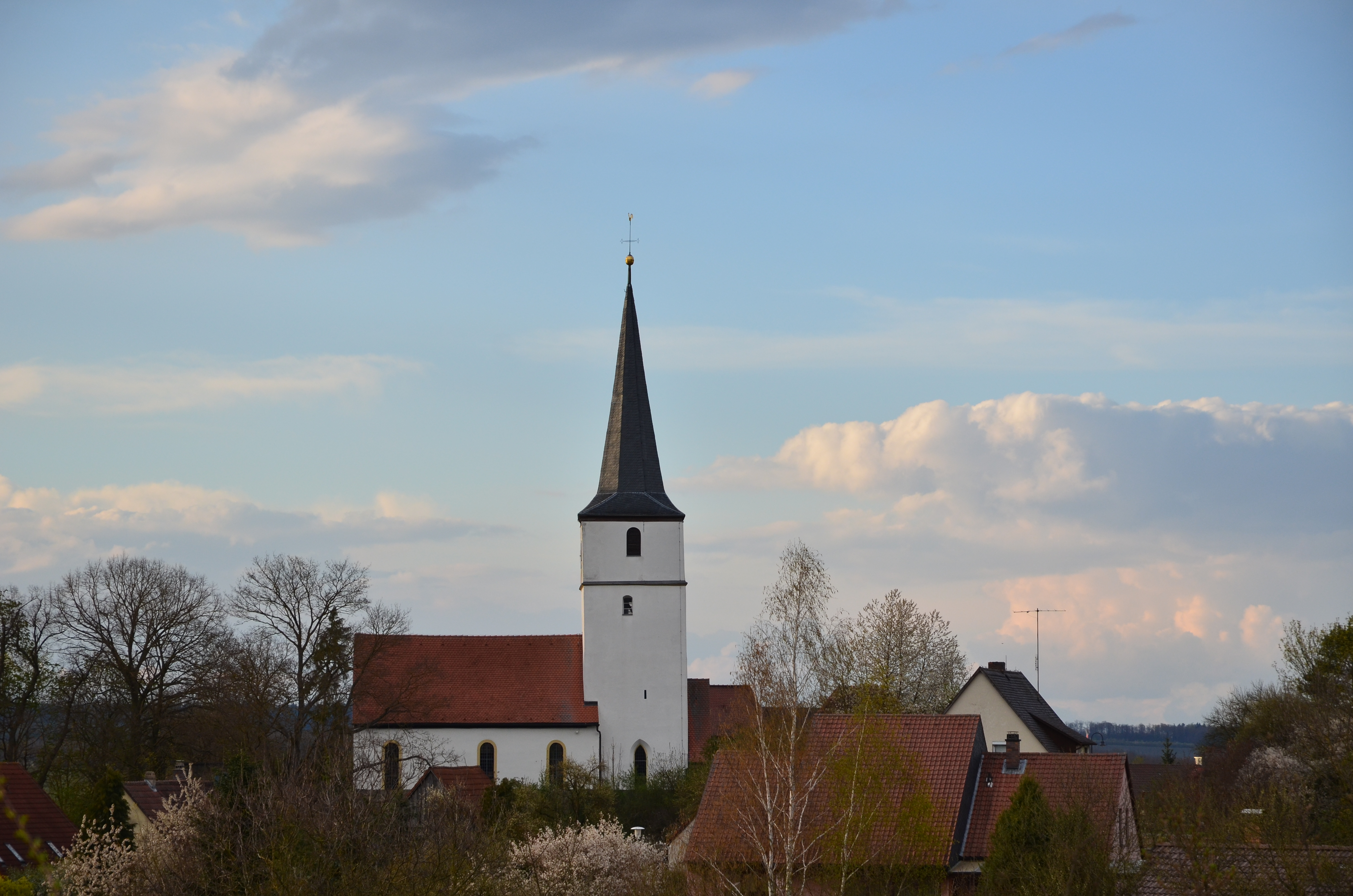 evang.-luth. Kirche St. Mauritius in Deutenheim